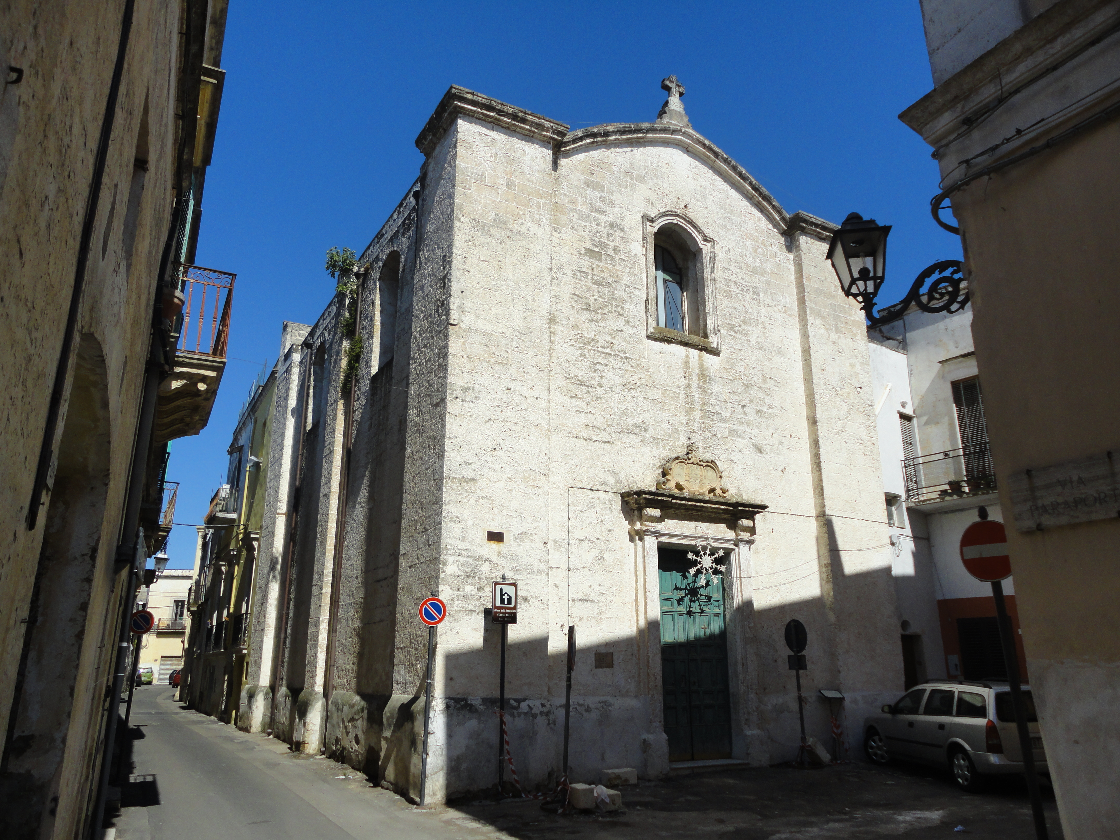 Chiesa dell'Annunziata di Galatone, Lecce